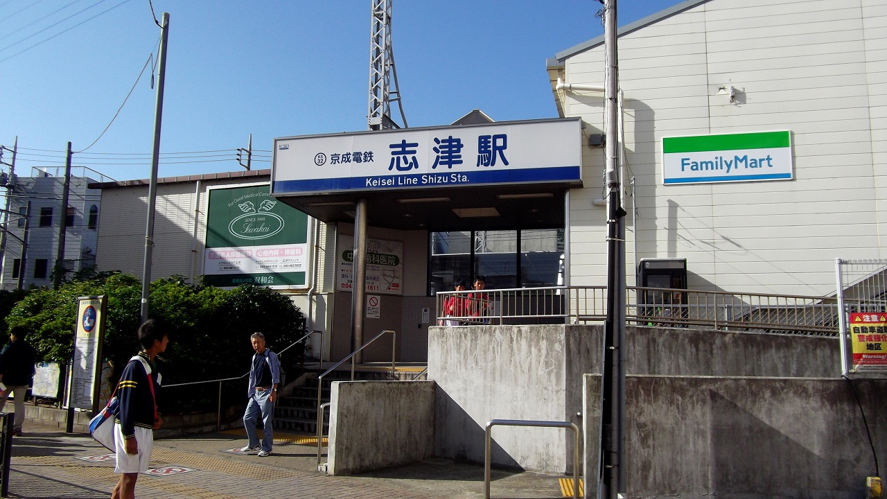 志津駅の駅舎